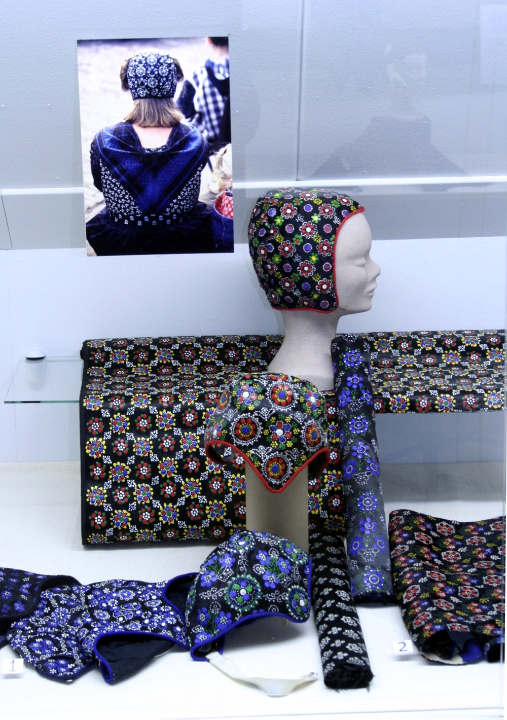 Staphorster stipwerkEsperanto: Farbo arto